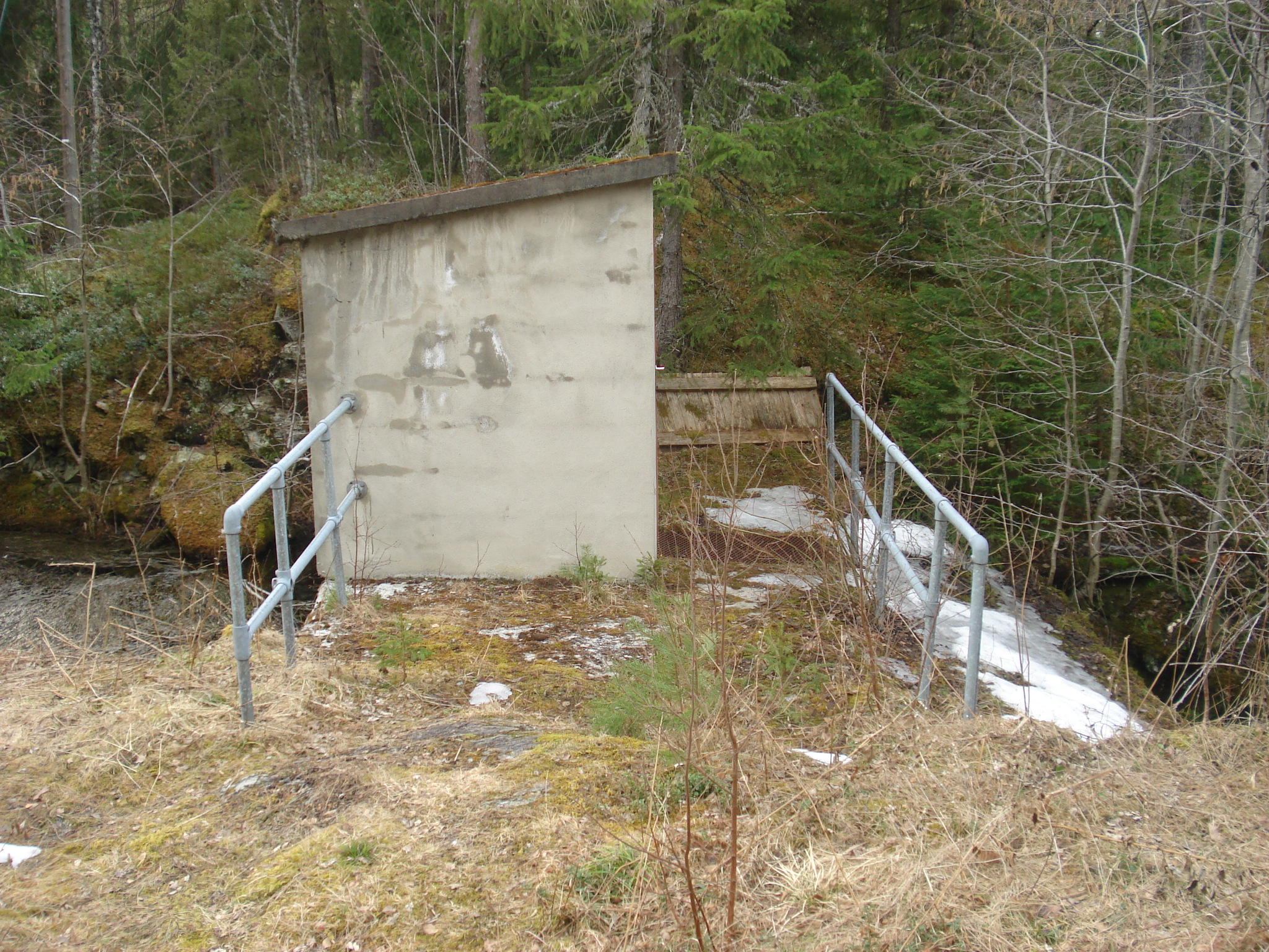 Stamn ved oset Hovdalsvatnet Nord-Trøndelag